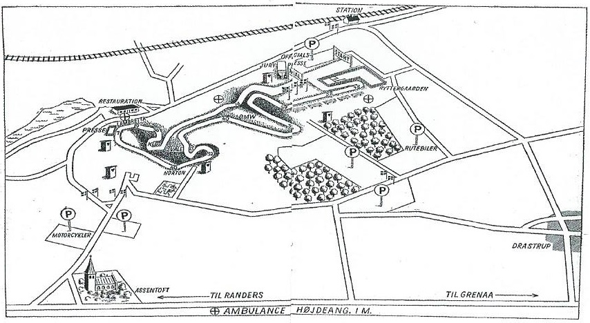 Skitse af Volk Mølle banen